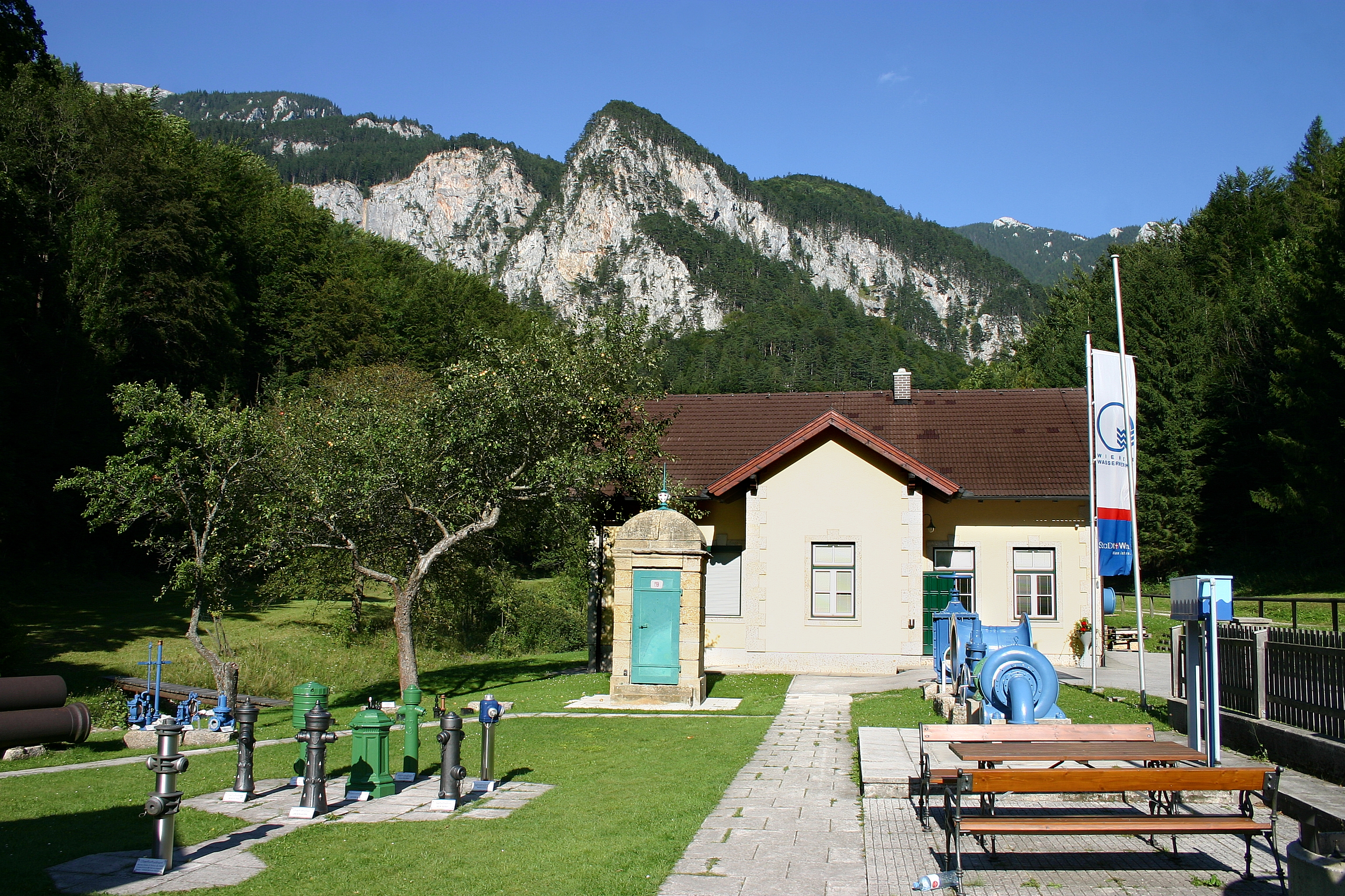 Kaiserbrunn Wasserleitungsmuseum Freigelände, Standort im Schwarzatal, Blick Richtung Krummbachgraben